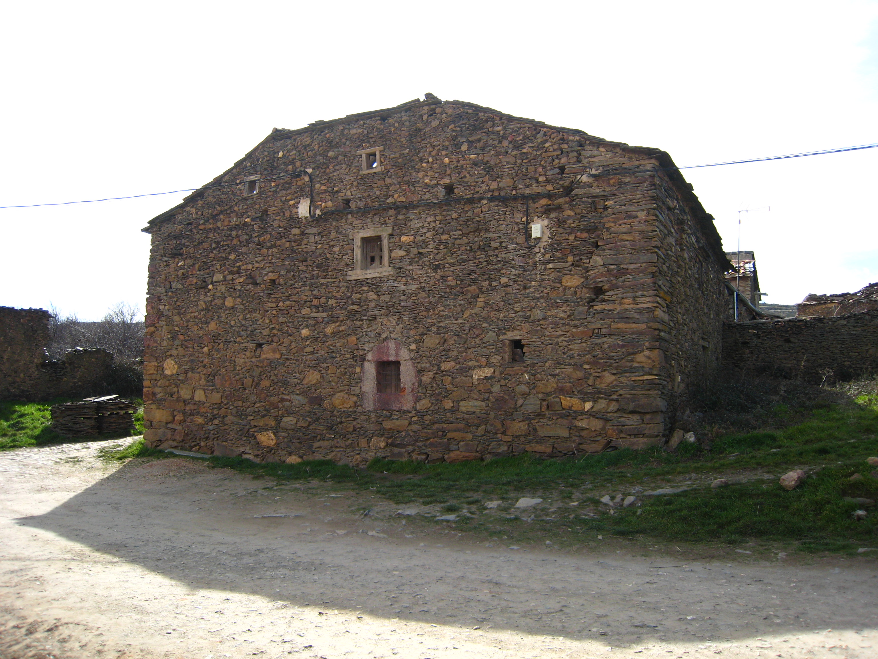 Serracín (Segovia), pueblo "negro" por su arquitectura tradicinal en pizarra.